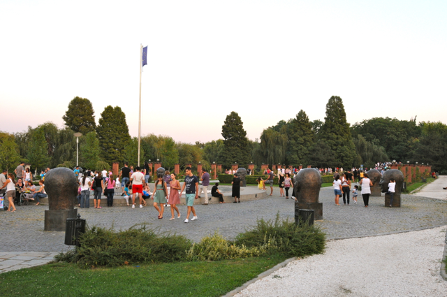 Monumentul fondatorilor UE, Parc Herastrau, Bucuresti